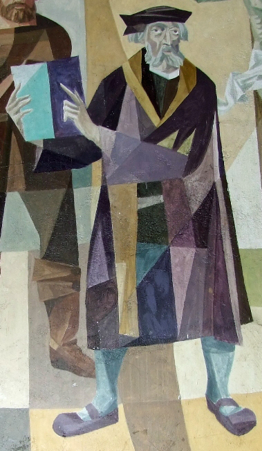 Der Memminger Reformator Christoph Schapeller (*1472 St. Gallen, +1551 ebenda)